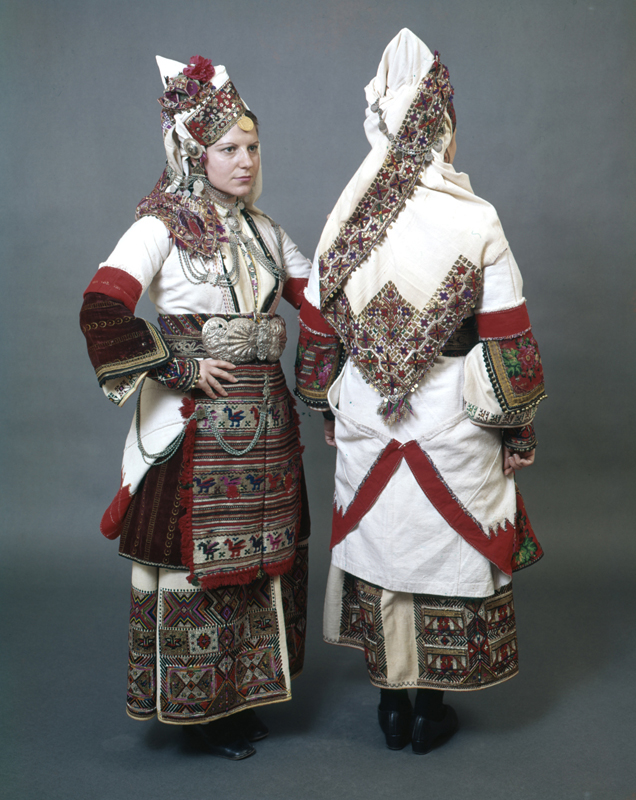 Νυφική ή γιορτινή φορεσιά με τον λευκό σαγιά από την Επισκοπή Ημαθίας. Συλλογή Πελοποννησιακού Λαογραφικού Ιδρύματος, Ναύπλιο